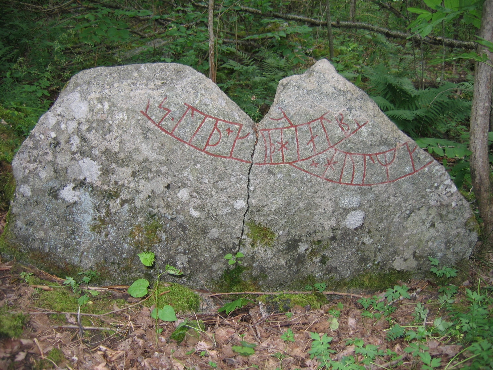 Runestone